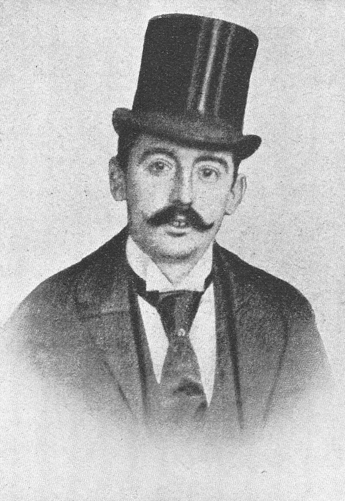 Frédéric de Civry, franz. Radrennfahrer und Geschäftsmann